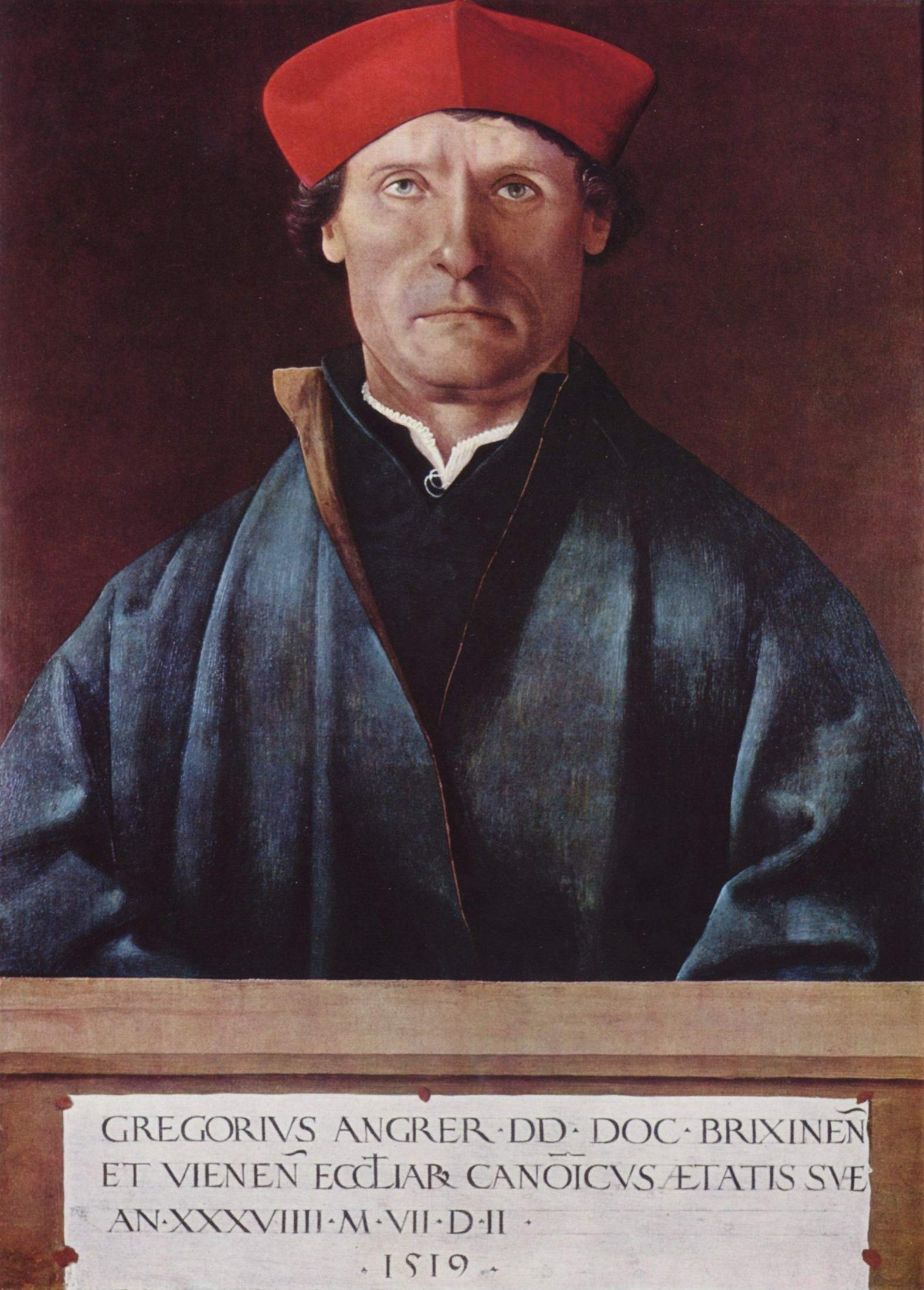 Brixener Domherr; geb. 1476 in Wien; 1510 Domherr in Wien; 1515 Kanonikus in Brixen; 1527-1528 in kaiserlichen Diensten Gesandter in Venedig; 1530 Dompropst in Brixen und Bischof von Wiener Neustadt; 1531 exkommuniziert und 1532 rehabilitiert; 1539 Domdekan; gest. 1548 in Wien.